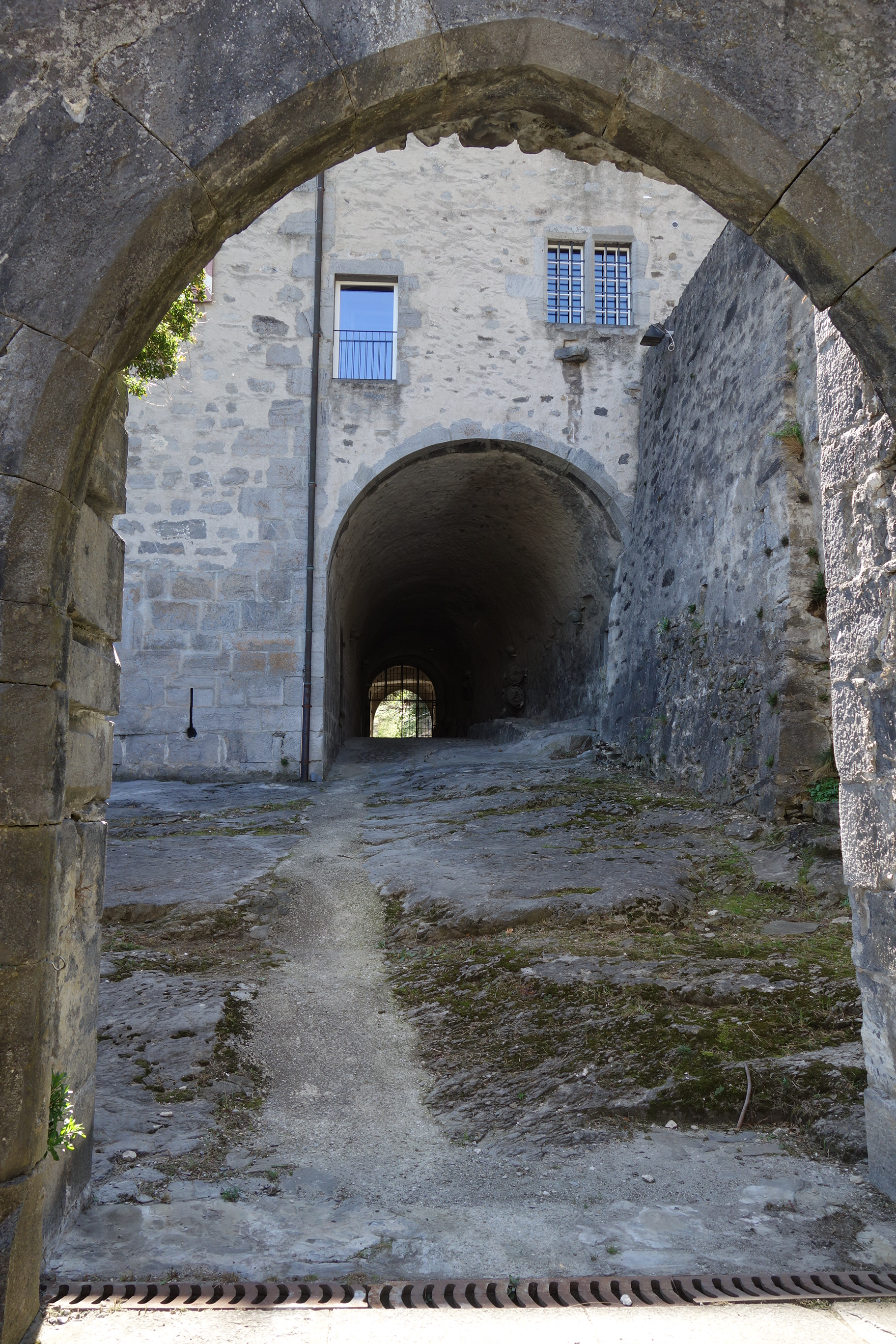 Schloss Saint-Maurice VS, Schweiz